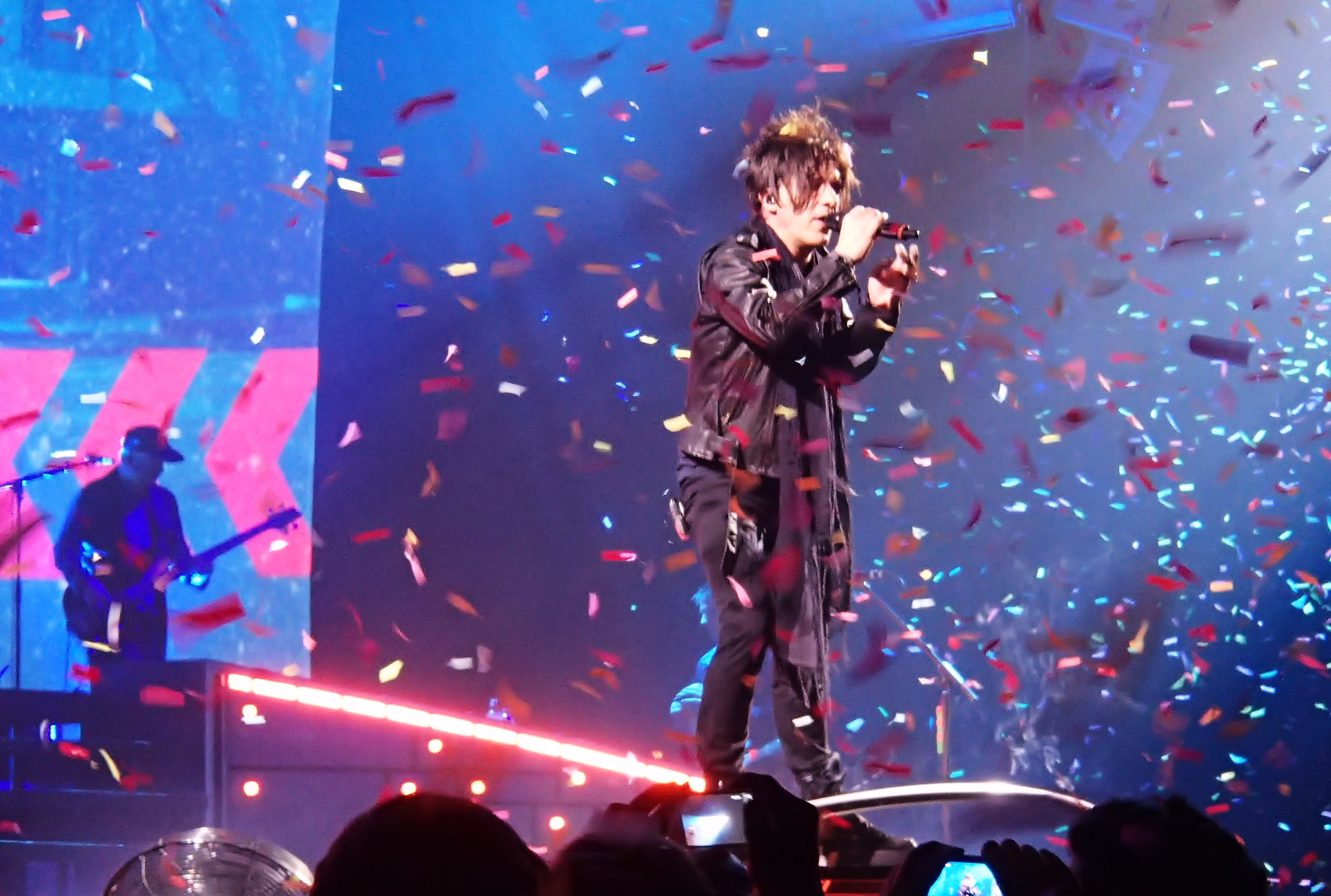 Nicola Sirkis, le chanteur d'Indochine en concert à Le Prisme, Aurillac, France. Mars 2013. BCTI